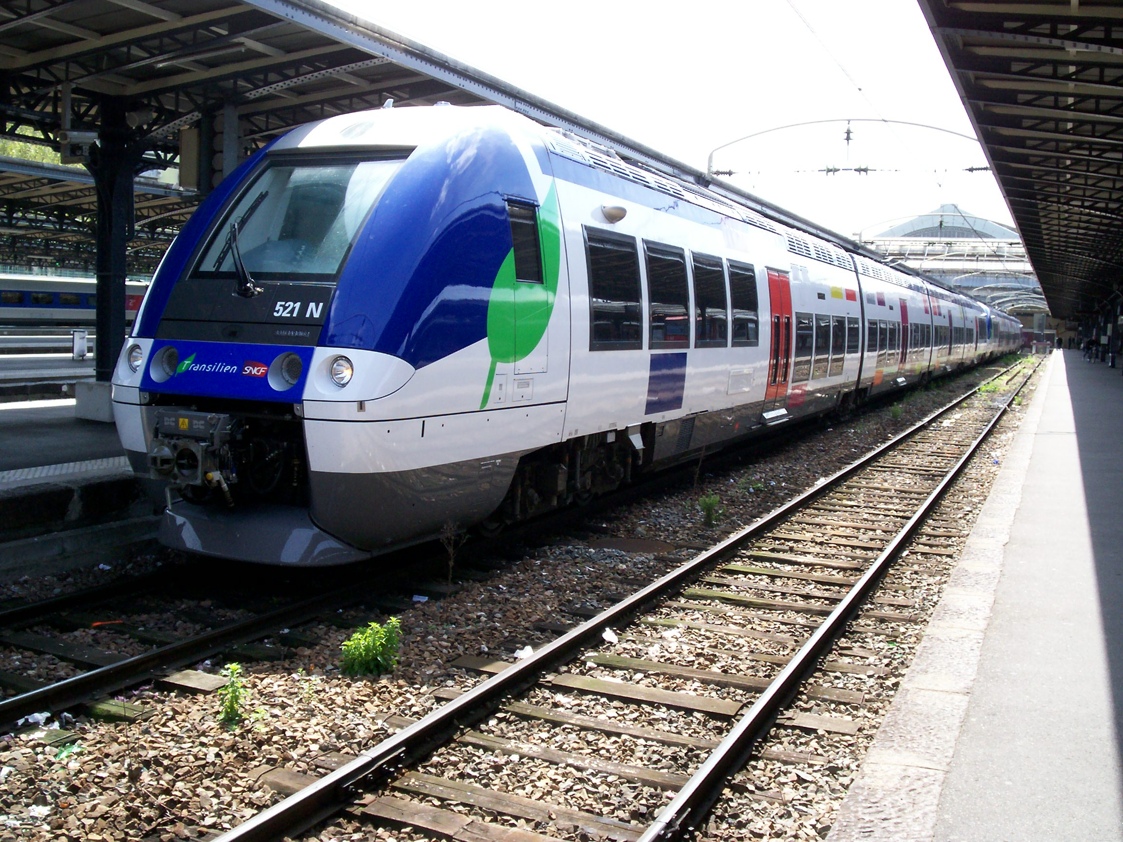 Autre vue de cet UM de B 82500 (AGC Bibi) Transilien à Paris-Est